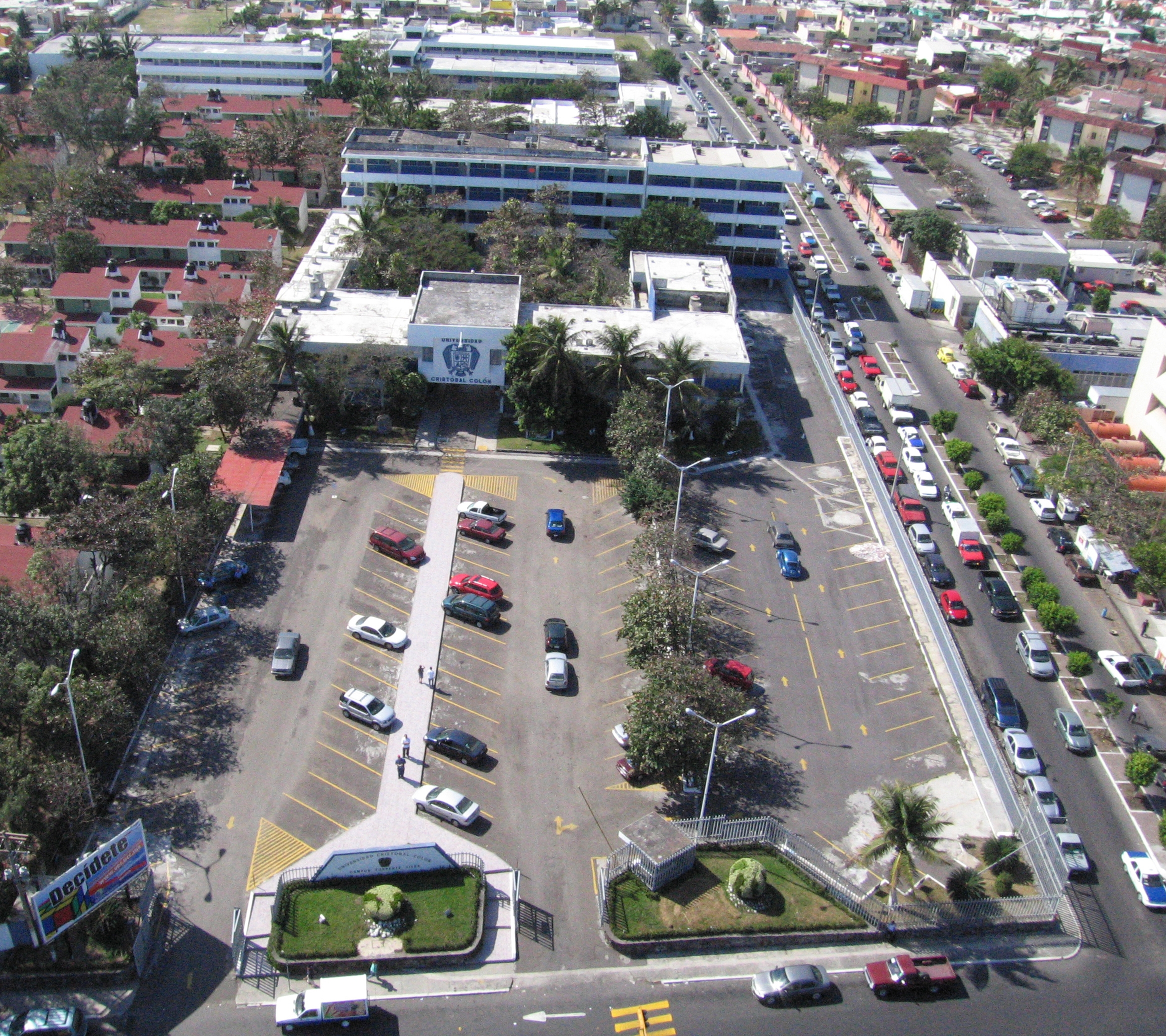 Vista aérea de la fachada del campus Torrente Viver, de la Universidad Cristóbal Colón (Veracruz) de México.